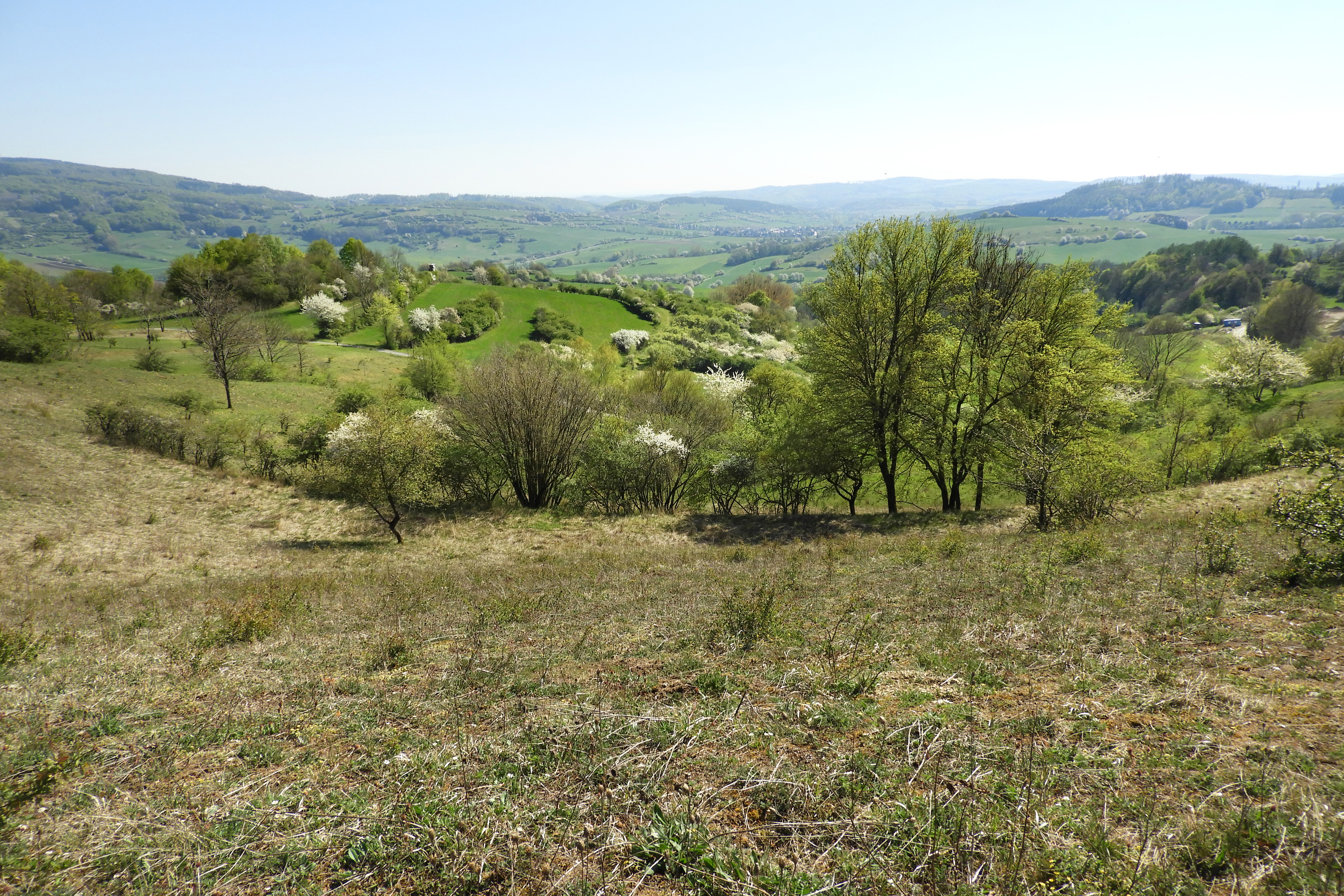 Der „Hohekopf bei Großalmerode“ erhebt sich mit einer Höhe von 539,4 m östlich von Epterode aus der Mittelgebirgslandschaft der Söhre im nordhessischen Werra-Meißner-Kreis. Auf dem Bergrücken und einer östlich angrenzenden Senke haben sich Halbtrockenrasen und Sumpfwiesen entwickelt, die zum Lebensraum seltener Pflanzen und Tiere geworden sind. Um den Standort stark gefährdeter Arten zu erhalten und fortzuentwickeln wurden knapp vierzehn Hektar, auf dem umgangssprachlich auch Epteröder Kopf genannten Gipfel, im Jahr 1986 als Naturschutzgebiet ausgewiesen. Mit rund 49 Hektar, durch eine Erweiterung mit südlich angrenzenden Flächen, ist dieser Bereich später auch als gleichnamiges Flora-Fauna-Habitat-Gebiet zu einem Teil des europaweiten Schutzgebietssystems „Natura 2000“ geworden, das eine länderübergreifende Vernetzung von bedrohten Lebensräumen zum Ziel hat.